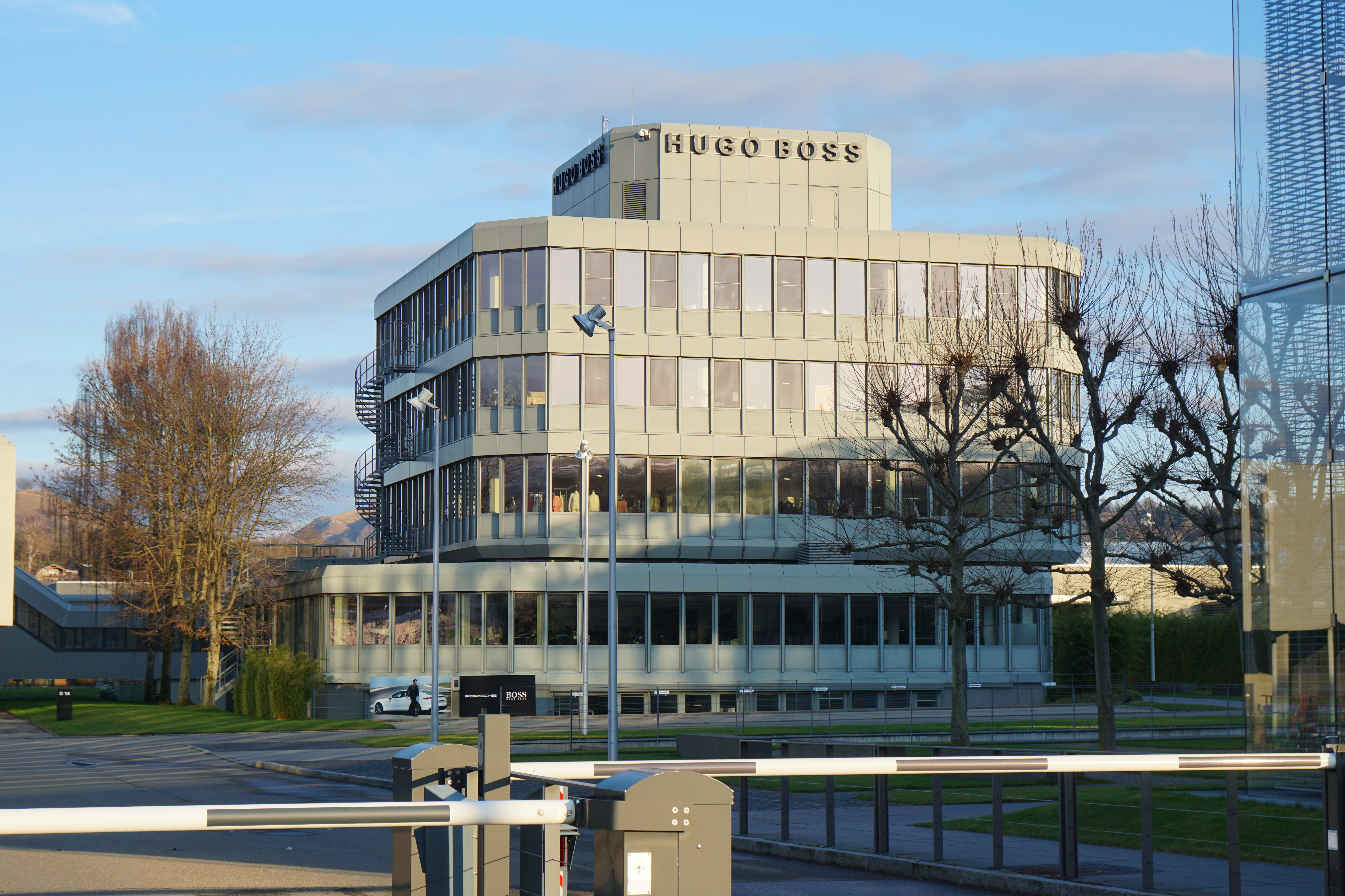 Buildings of Hugo Boss AG in Metzingen, headquarters Dieselstraße.